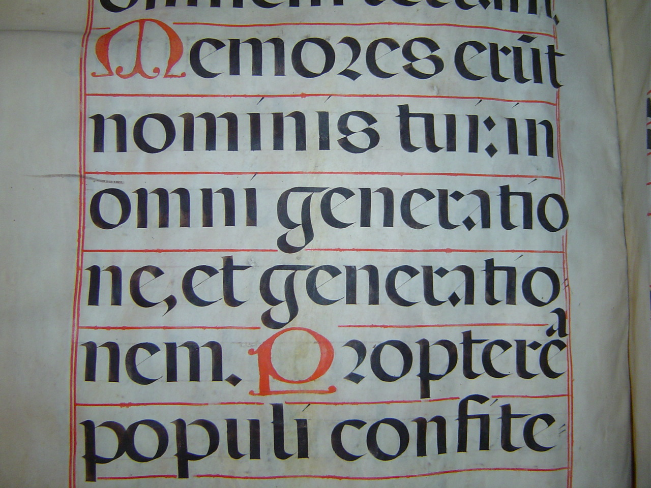 Libro de coro de la Catedral de México